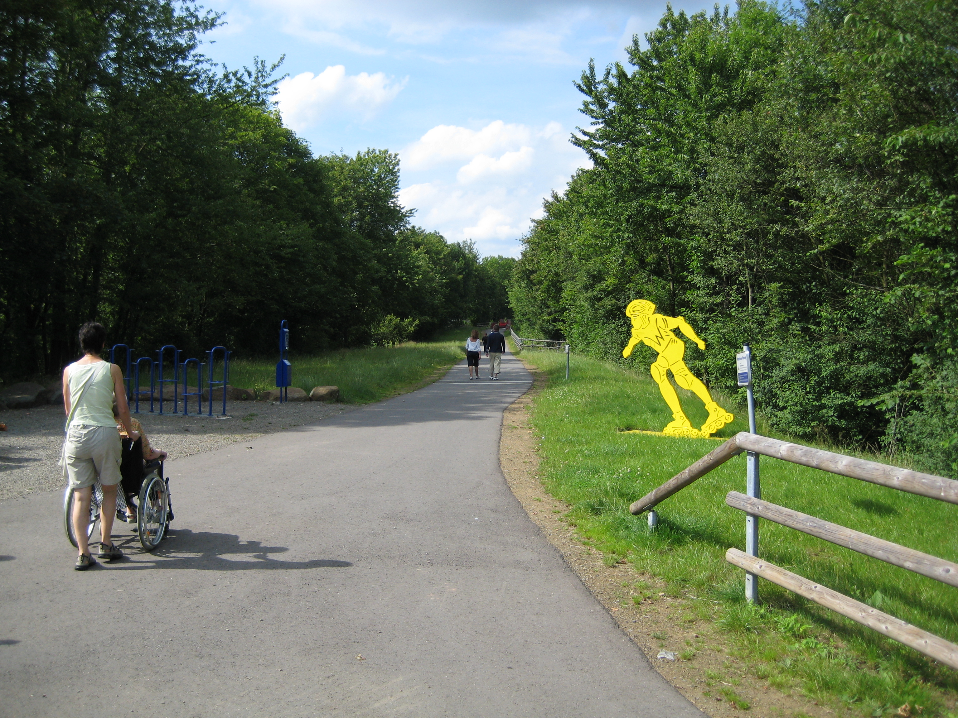 Wendelinus-Radweg, Anfang bei St. Wendel